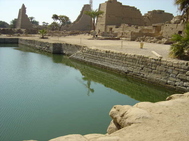 Eigen foto Ben Pirard januari 2007 Karnak